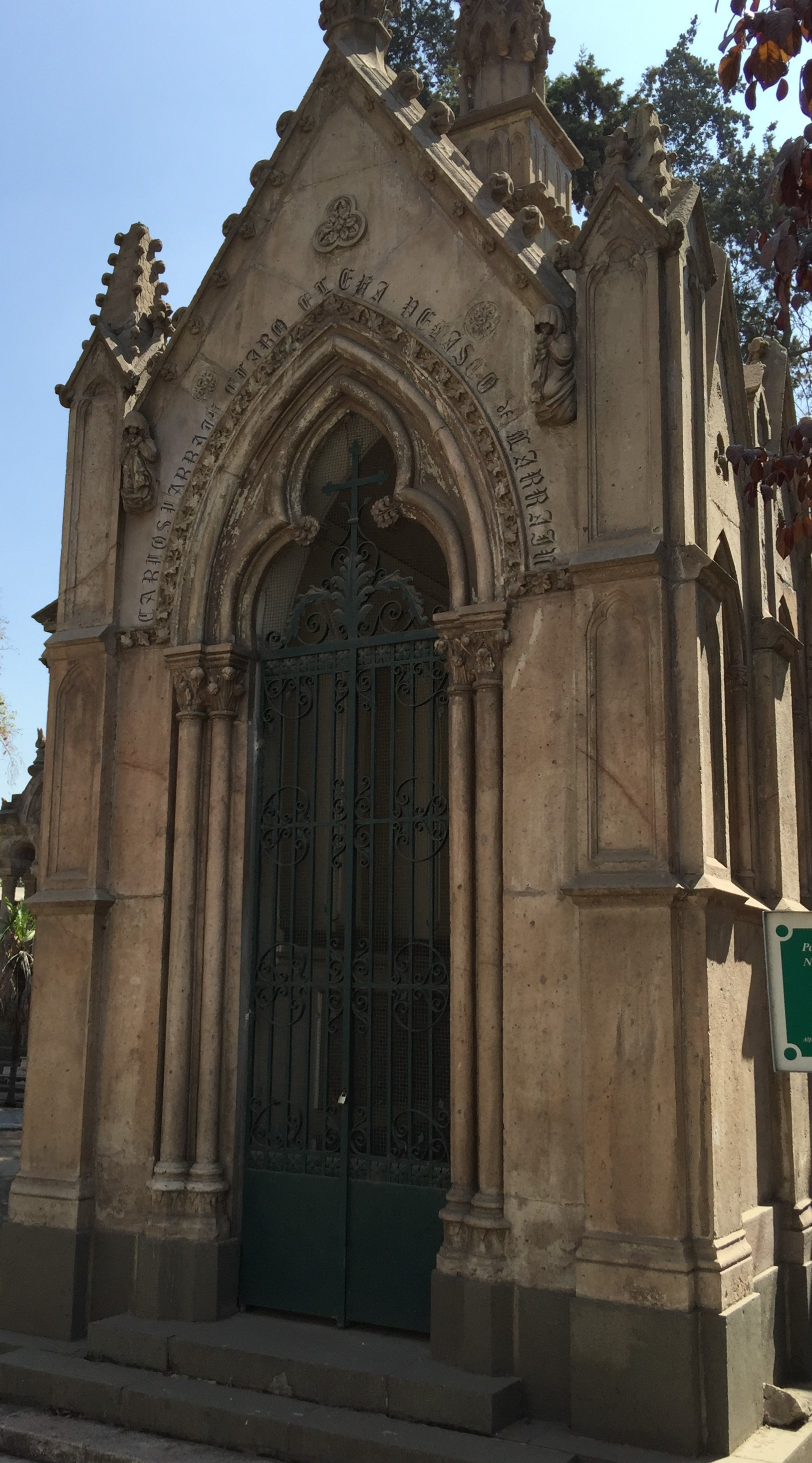 Mausoleo de Carlos Larraín Claro, nació en Santiago, el 27 de agosto de 1871 y falleció en la misma ciudad el 22 de enero de 1927. Fue abogado, destacado funcionario de Correos de Chile, diputado, ministro y director de empresas chileno. Este Mausoleo fue reconocido por su nieta el 1 de junio del año 2012.